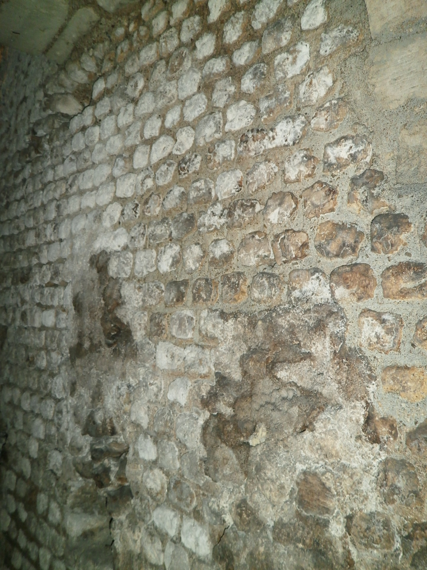 Vomitoire de l'amphithéâtre de Tours avant son agrandissement